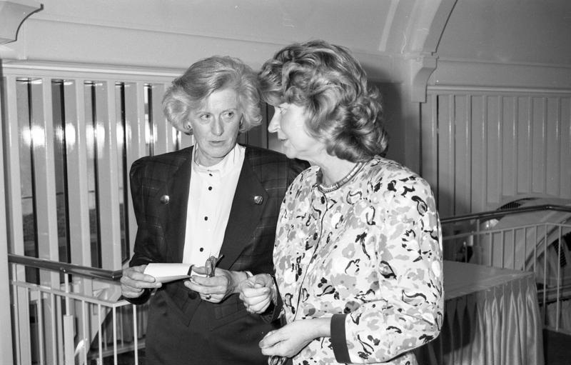 Bonn, 7.12.1990 Die Ehefrau des Bundesministers des Auswärtigen Amtes, Barbara Genscher, gab im Hotel Petersberg den traditionellen, alljährlichen Adventskaffee für Frauen ausländischer Diplomaten.